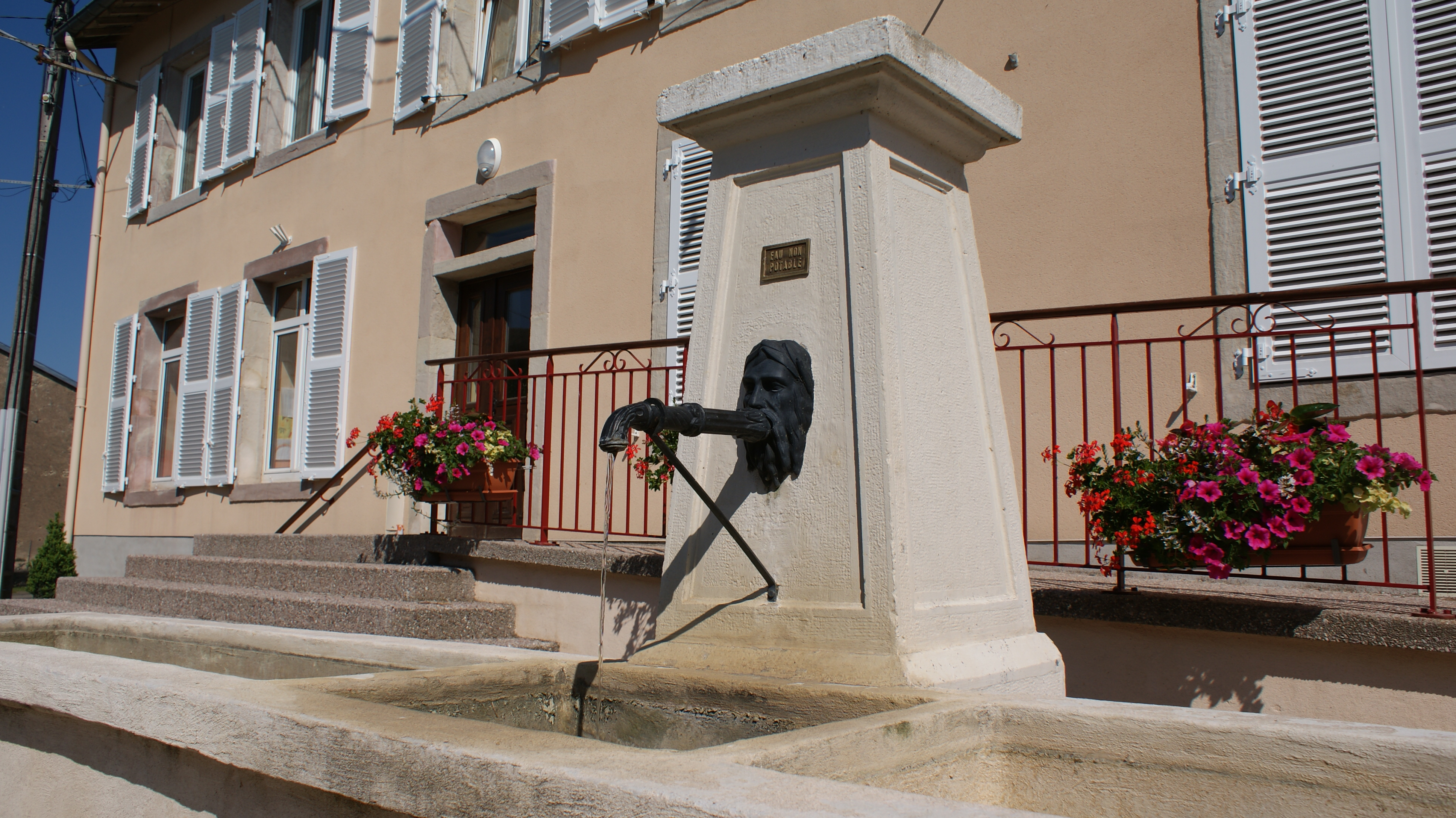 fontaine